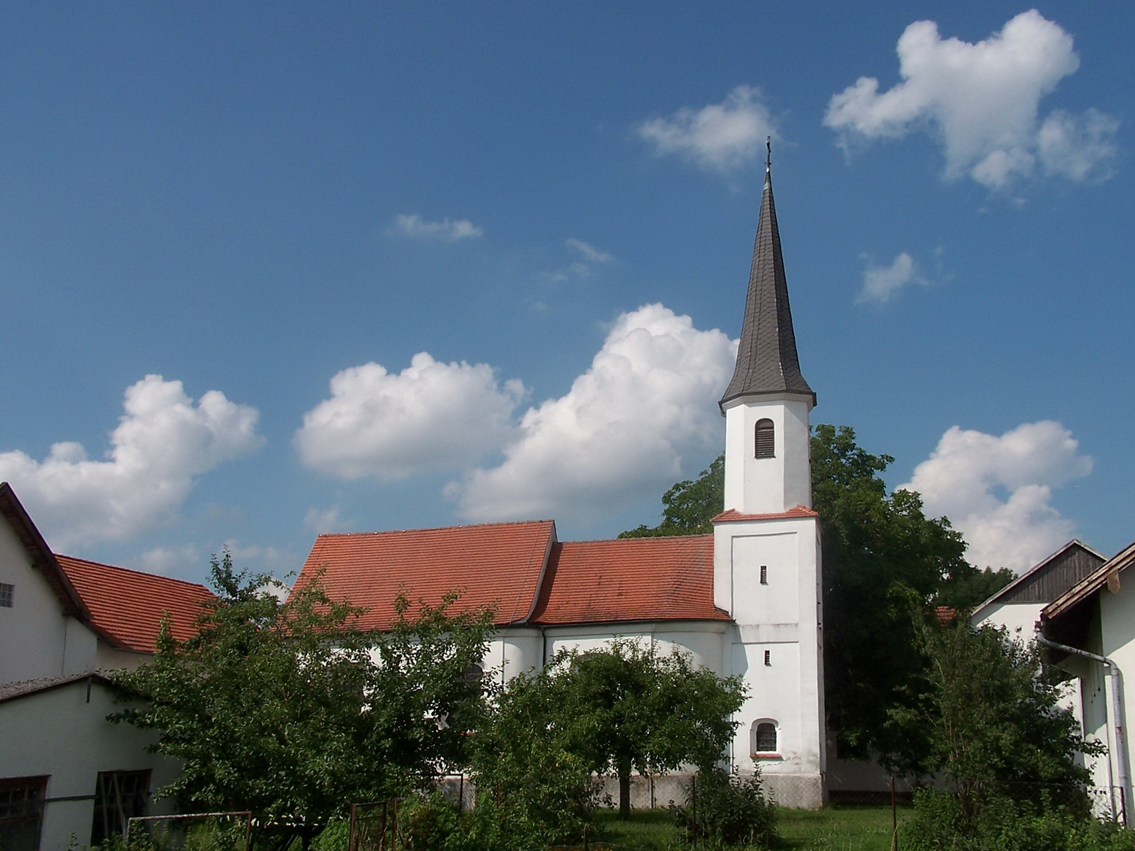 Hohenthann, Wachelkofen. Kirche Heilig Kreuz. Rokokobau von 1751; mit Ausstattung.